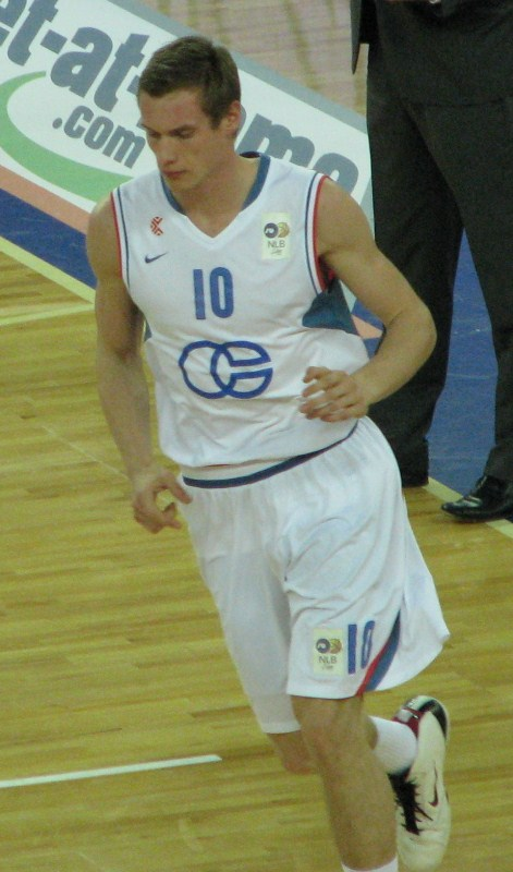 Leon Radošević